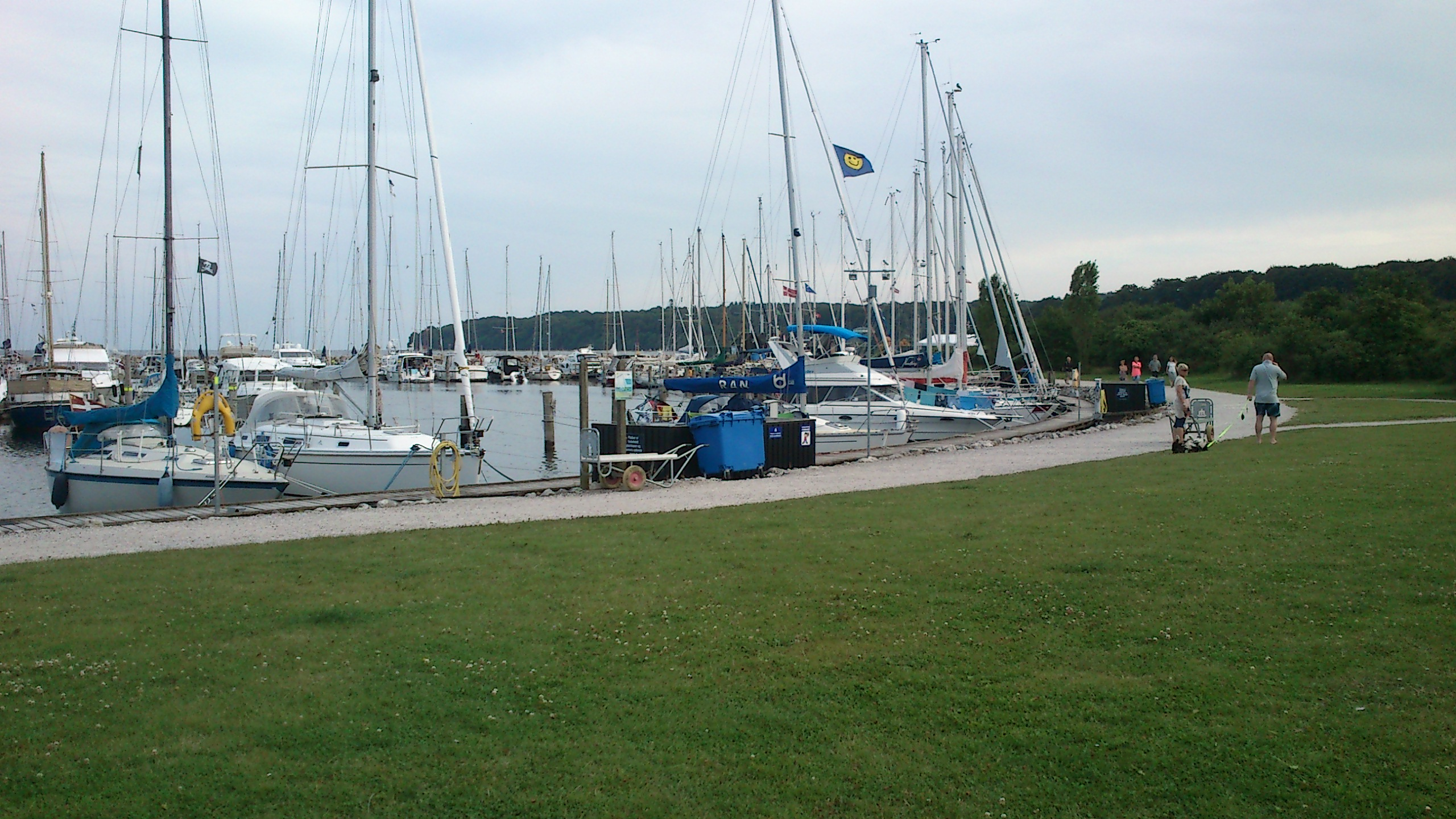 Marseliborg Lystbådehavn, kik mod syd.